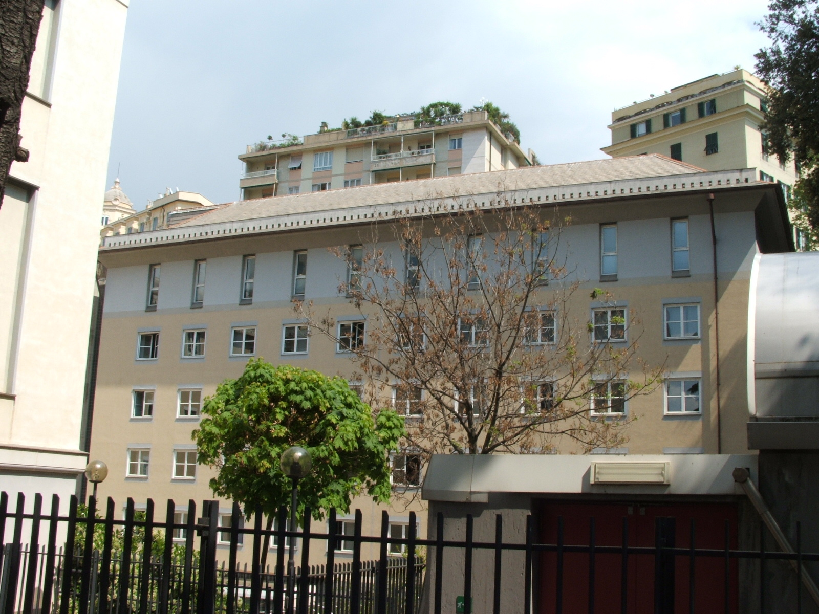 Genova, Biblioteca Berio